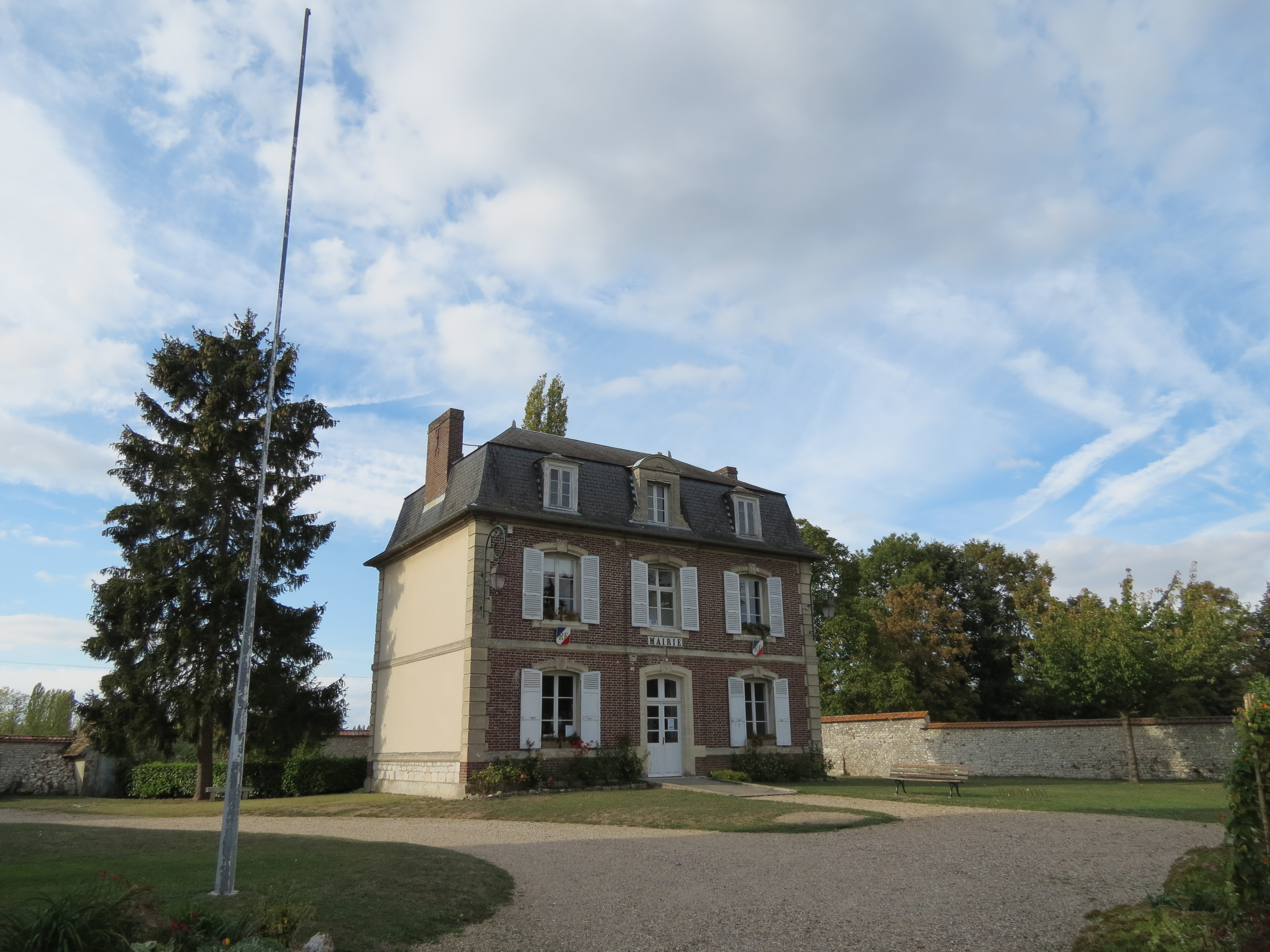 Mairie de Notre-Dame-de-l'Isle installée dans l'ancien presbytère.